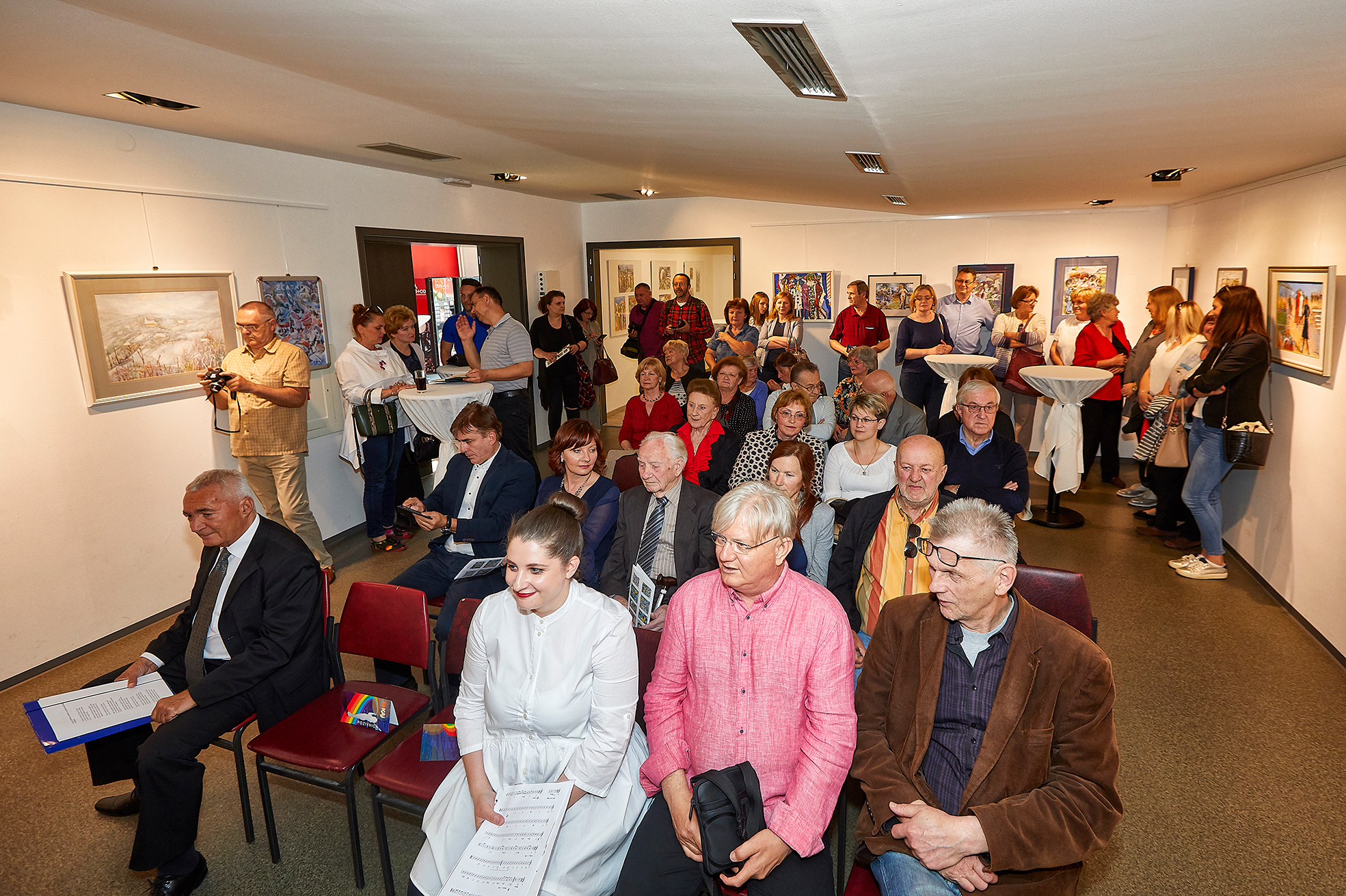 Otvorenje izložbe slika "Slike s rubova sna" Zlatka Crnaca u Galeriji Kraluš 24 5 19 - dio postava izložbe i atmosfera s otvorenja izložbe i promocije Crnecove zbirke pjesama "Agramerski valcertango"